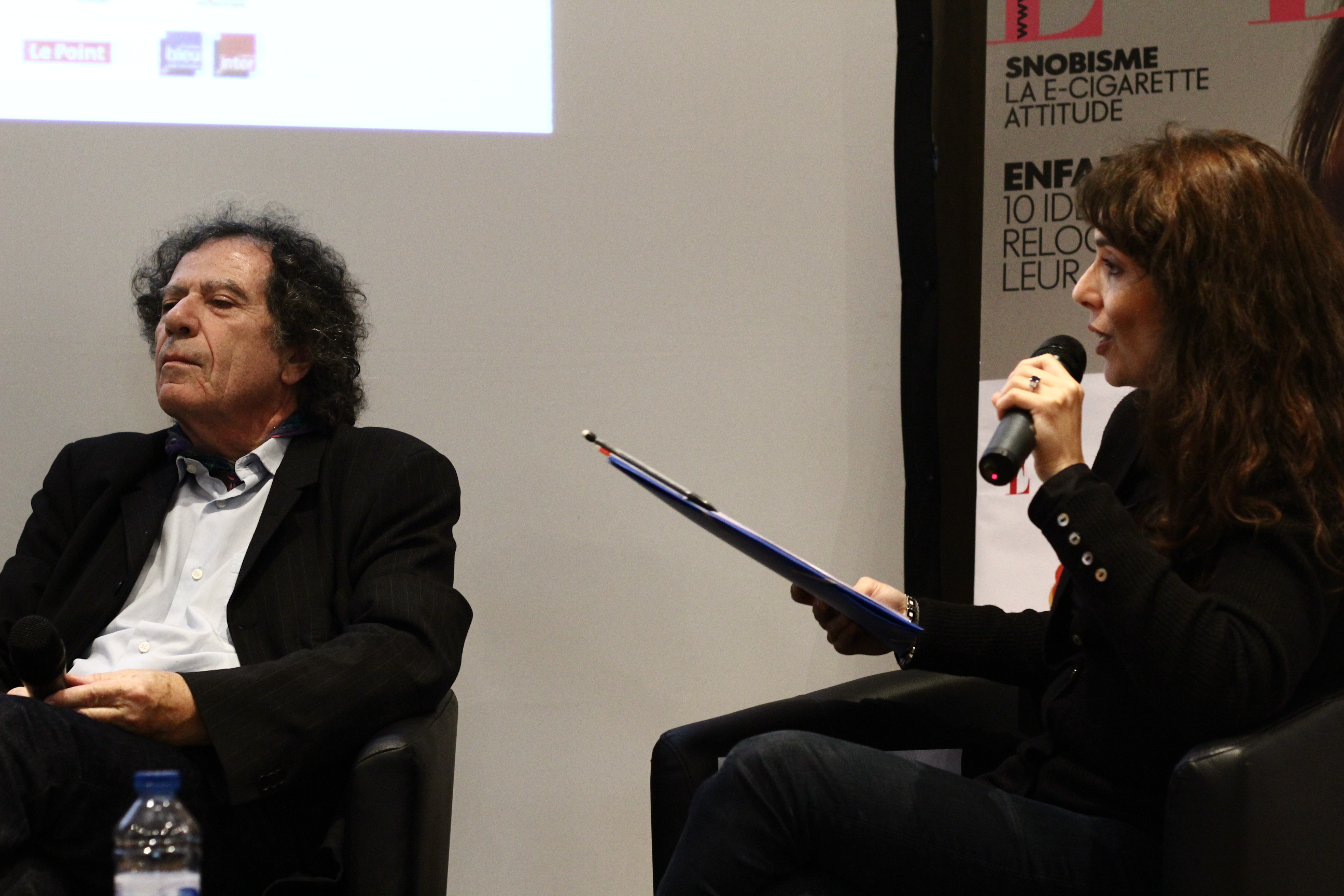 Alain Veinstein et Karine Papillaud (Le Point), au Livre sur la Place, septembre 2013.